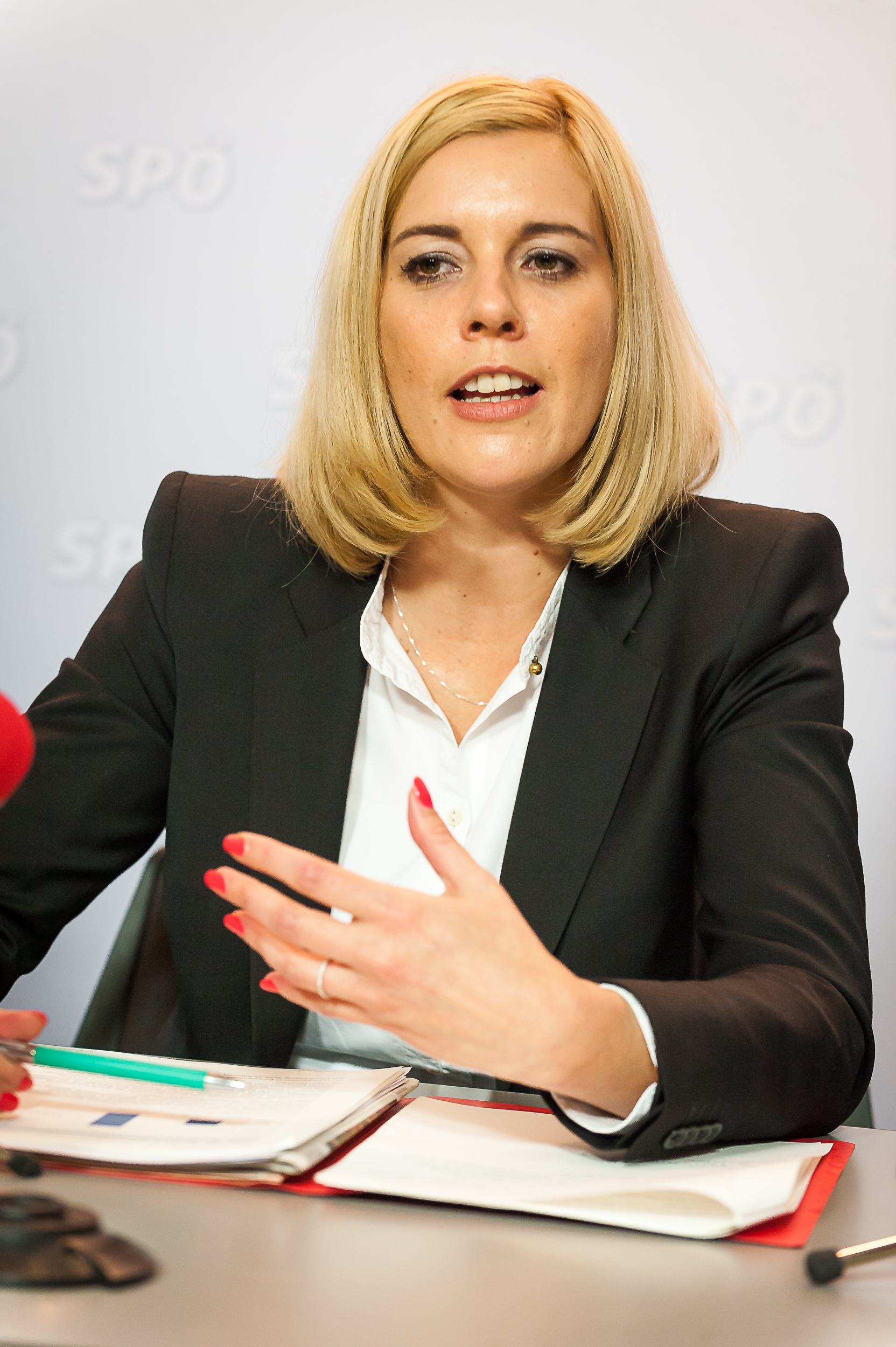 Pressekonferenz mit Sonja Steßl und Eugen Freund - 05.05.2014